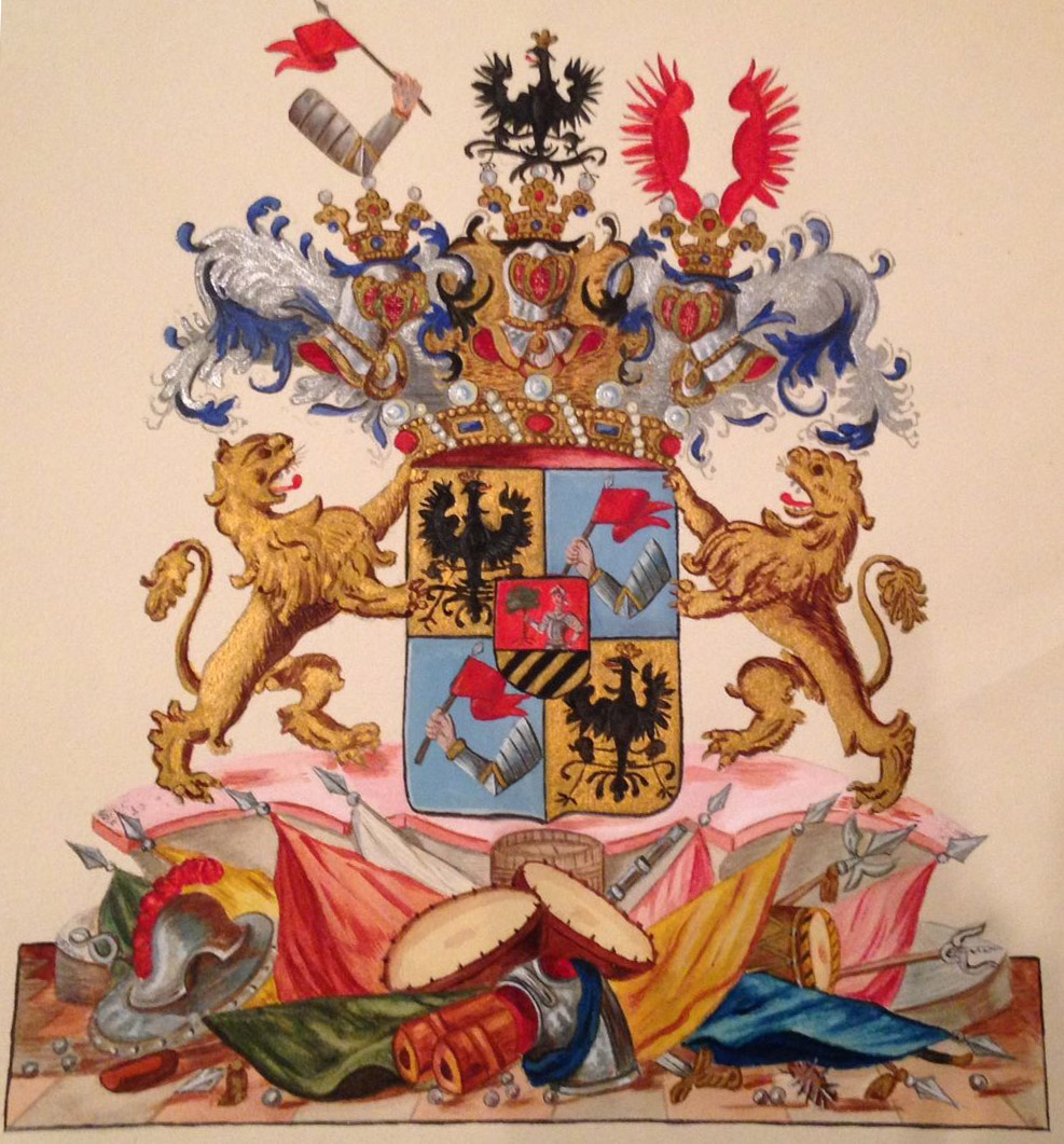 Familienwappen Longo-Liebenstein, stammt aus dem 17. Jahrhundert